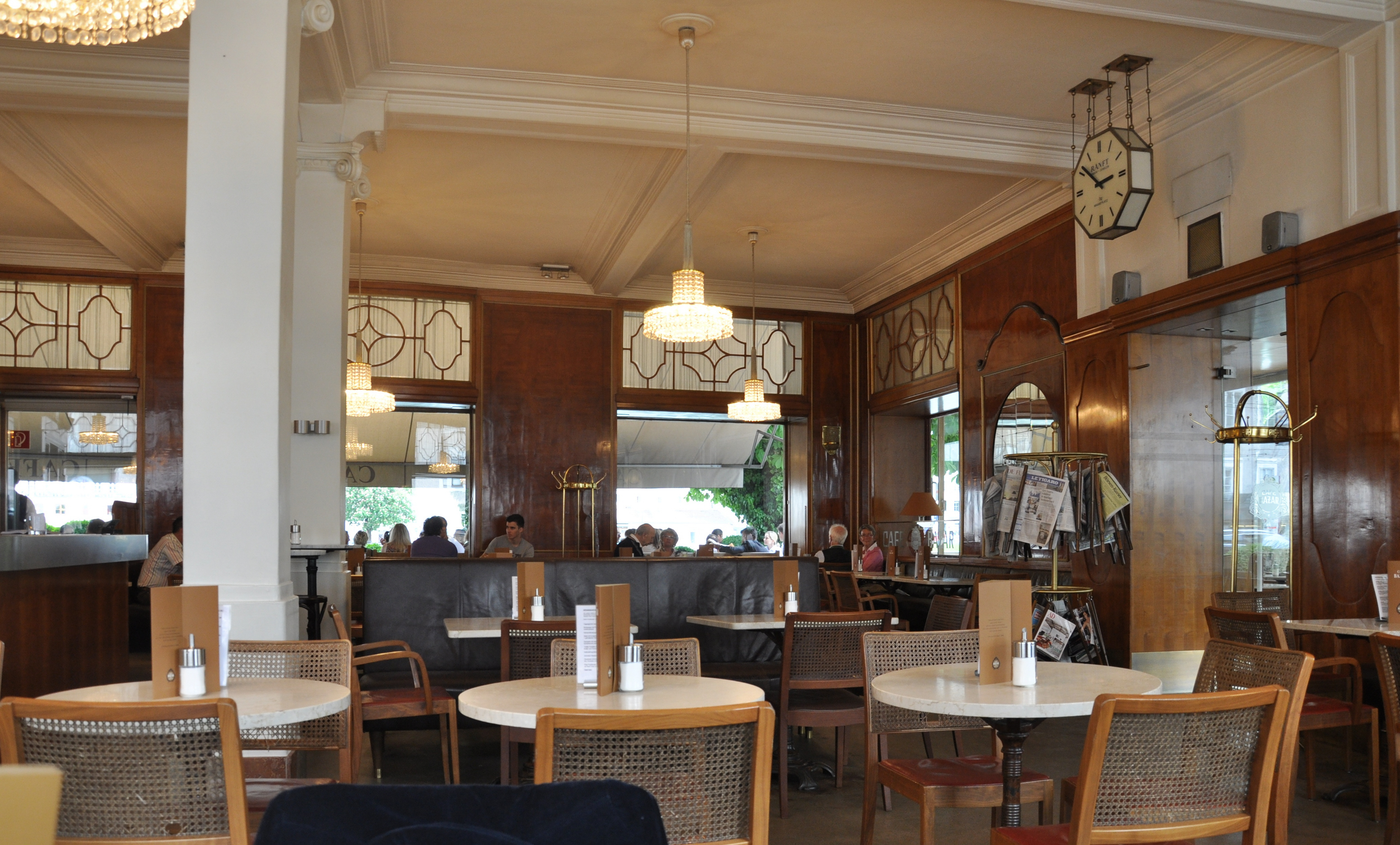 Salzburg, Café Bazar